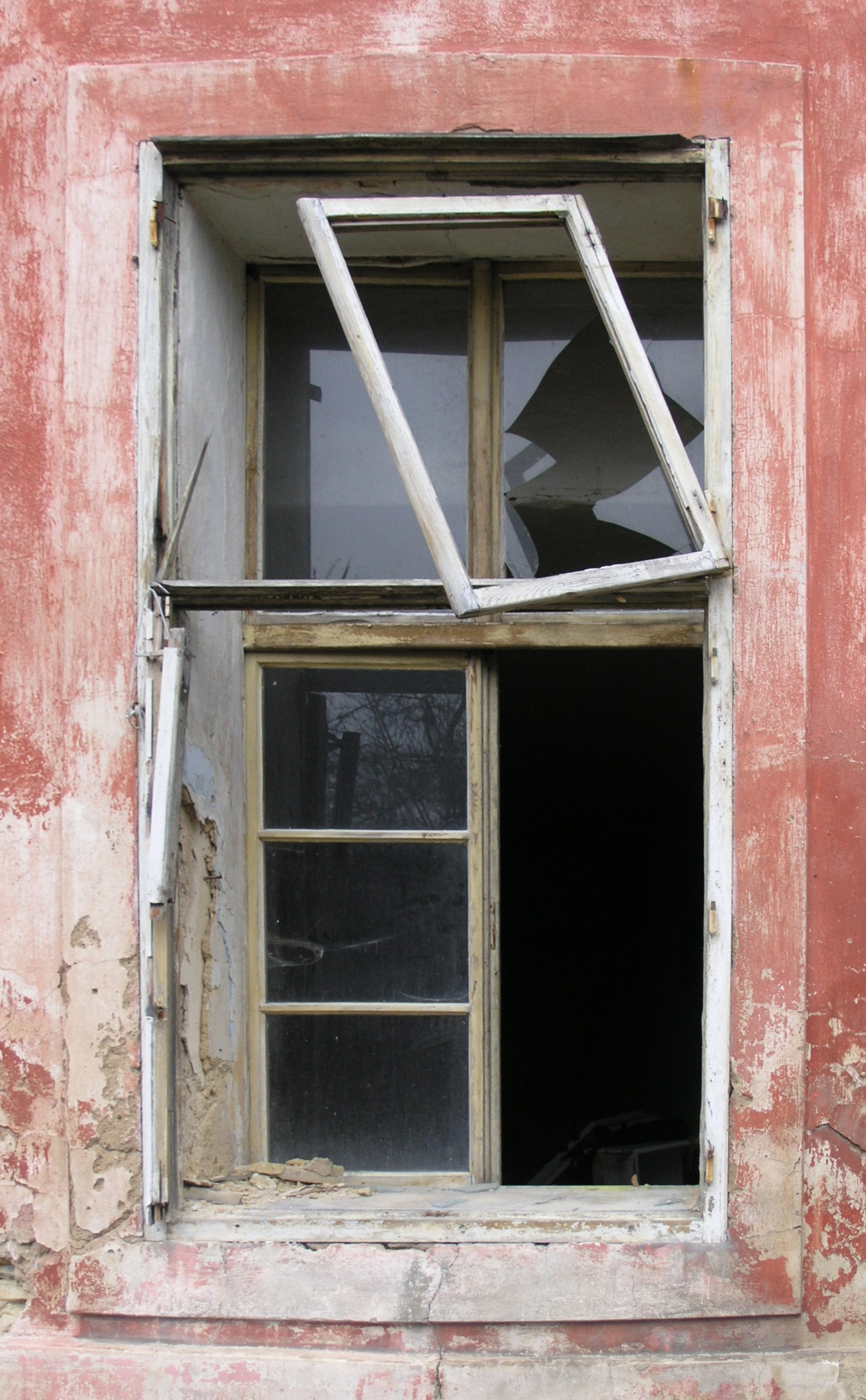 Praha, Břevnov - usedlost Kajetánka